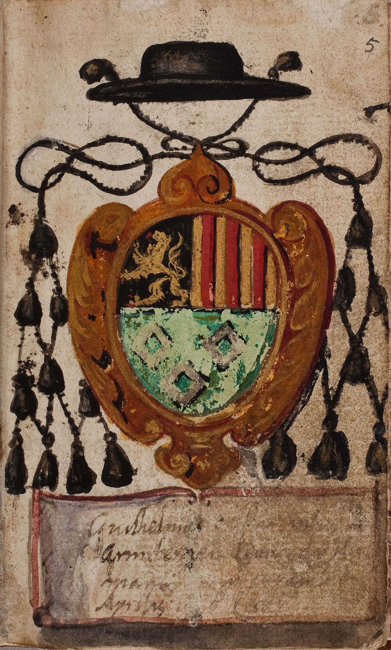 Albuminscriptie van Willem van Bergen